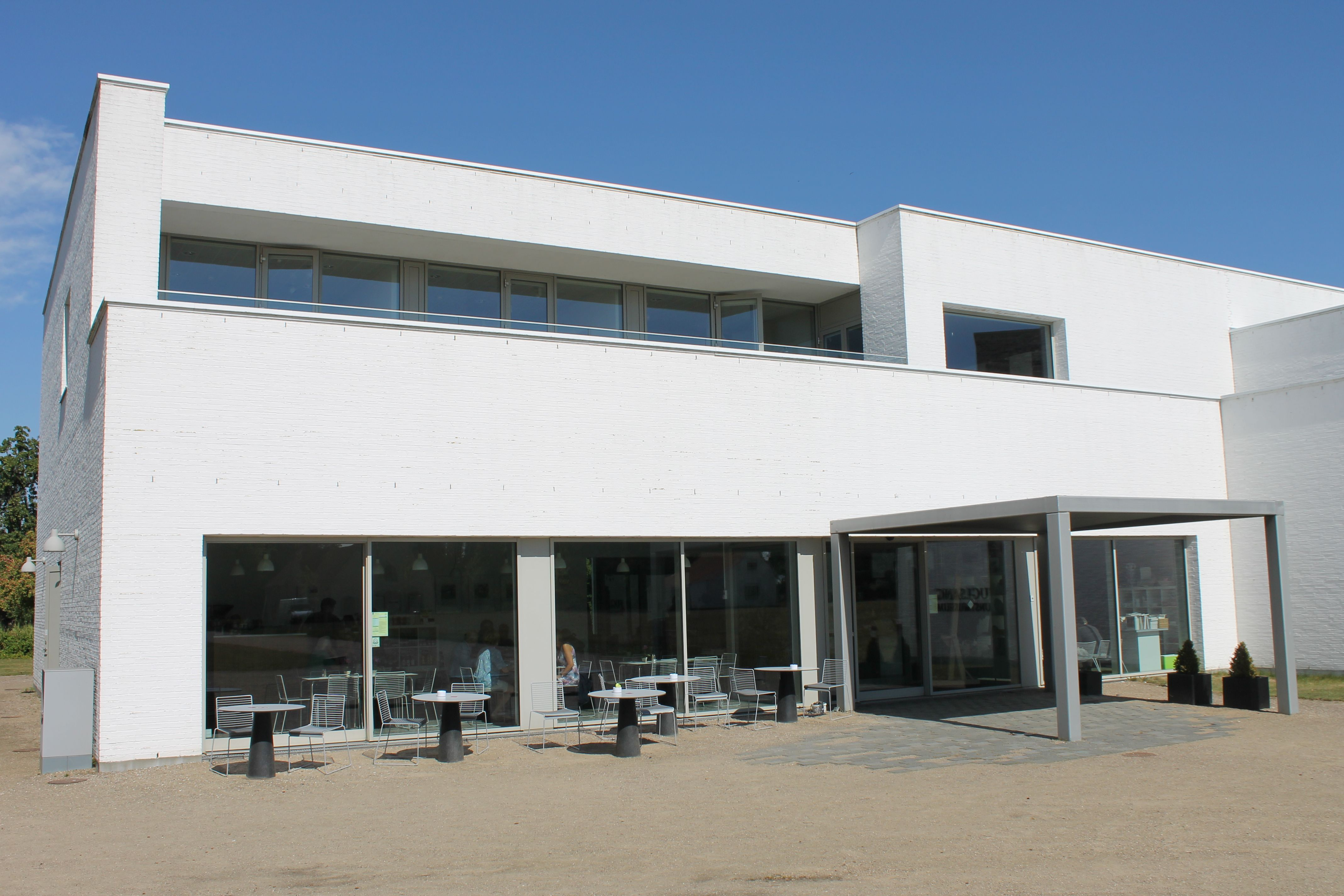 Fuglsang-Kunstmuseum, Eingang und Café